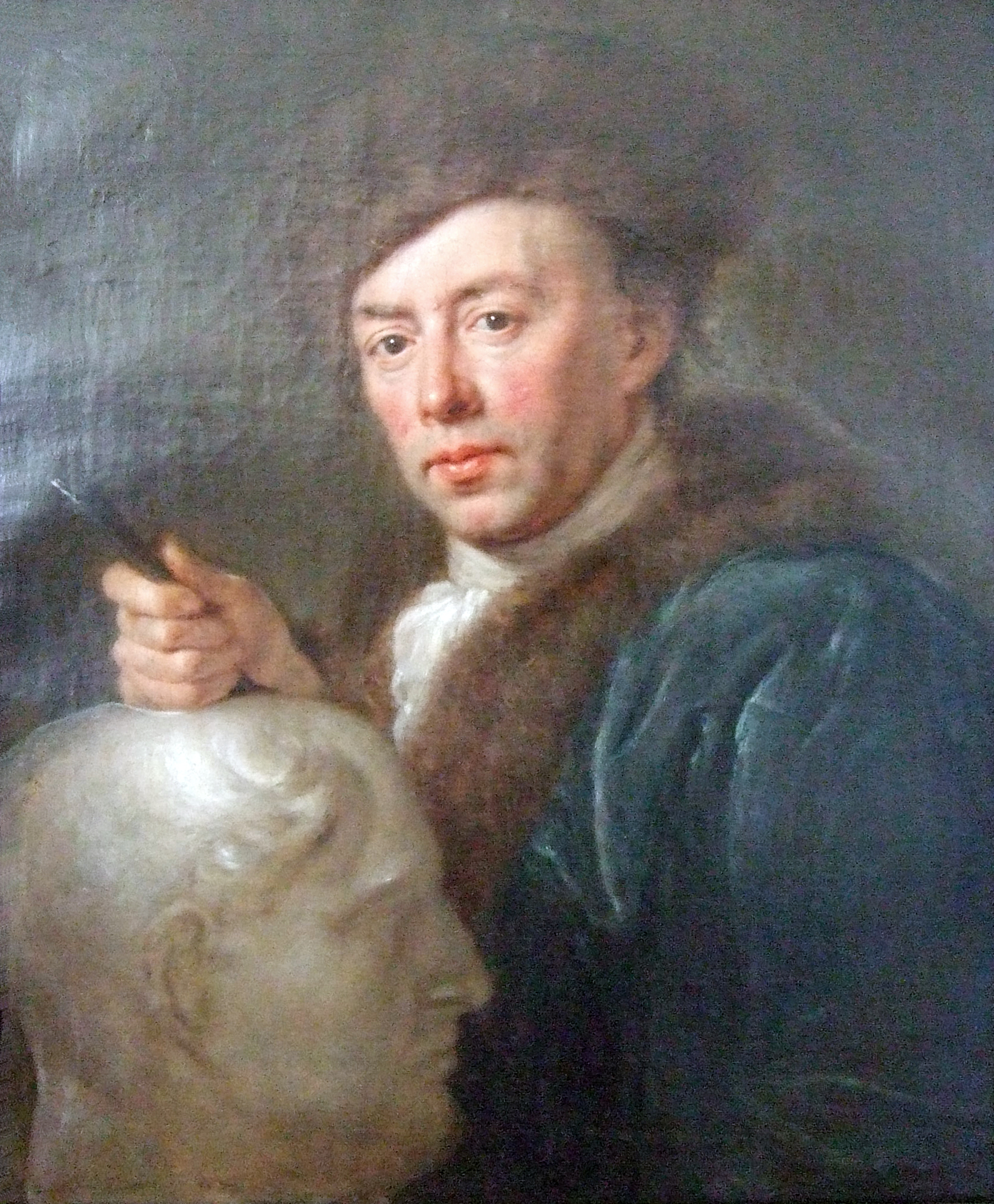 Porträt eines Bildhauers (vermutlich Carl Philip Glume)